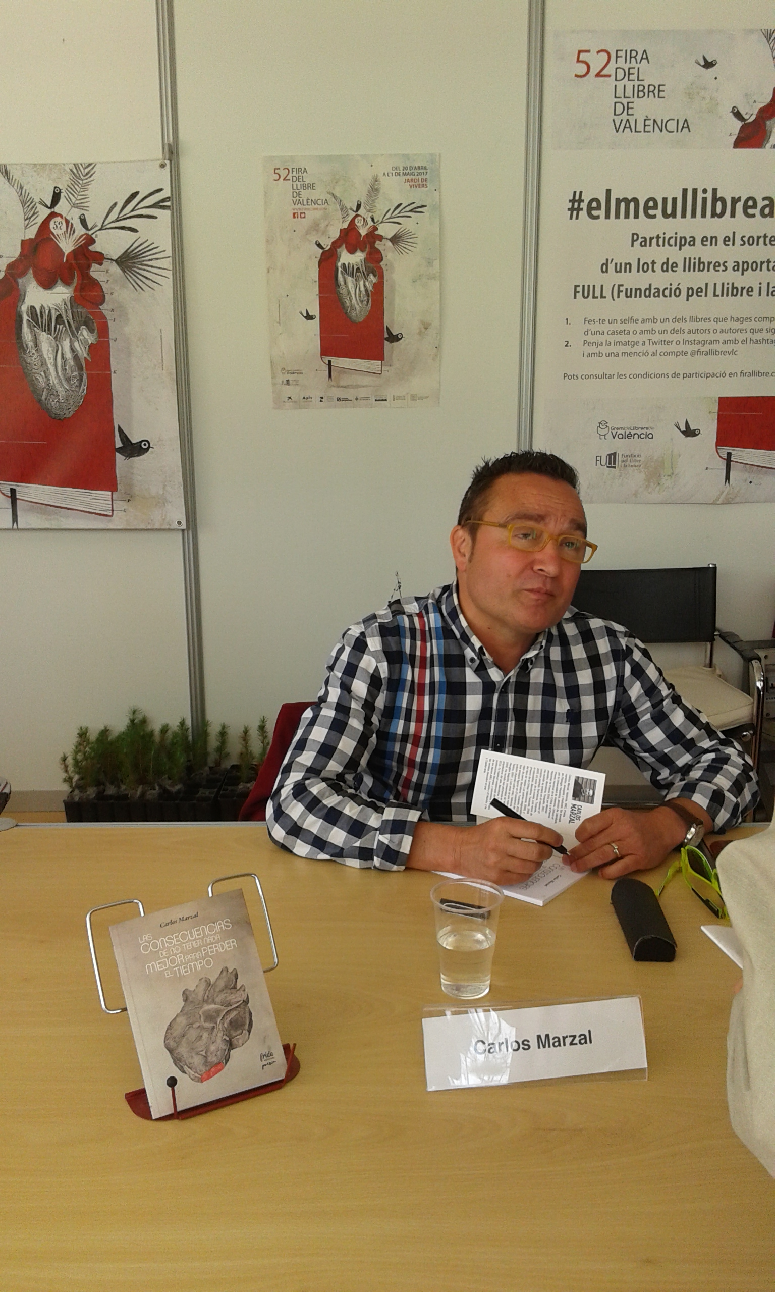 Carlos Marzal, a la Fira del Llibre de València 2017